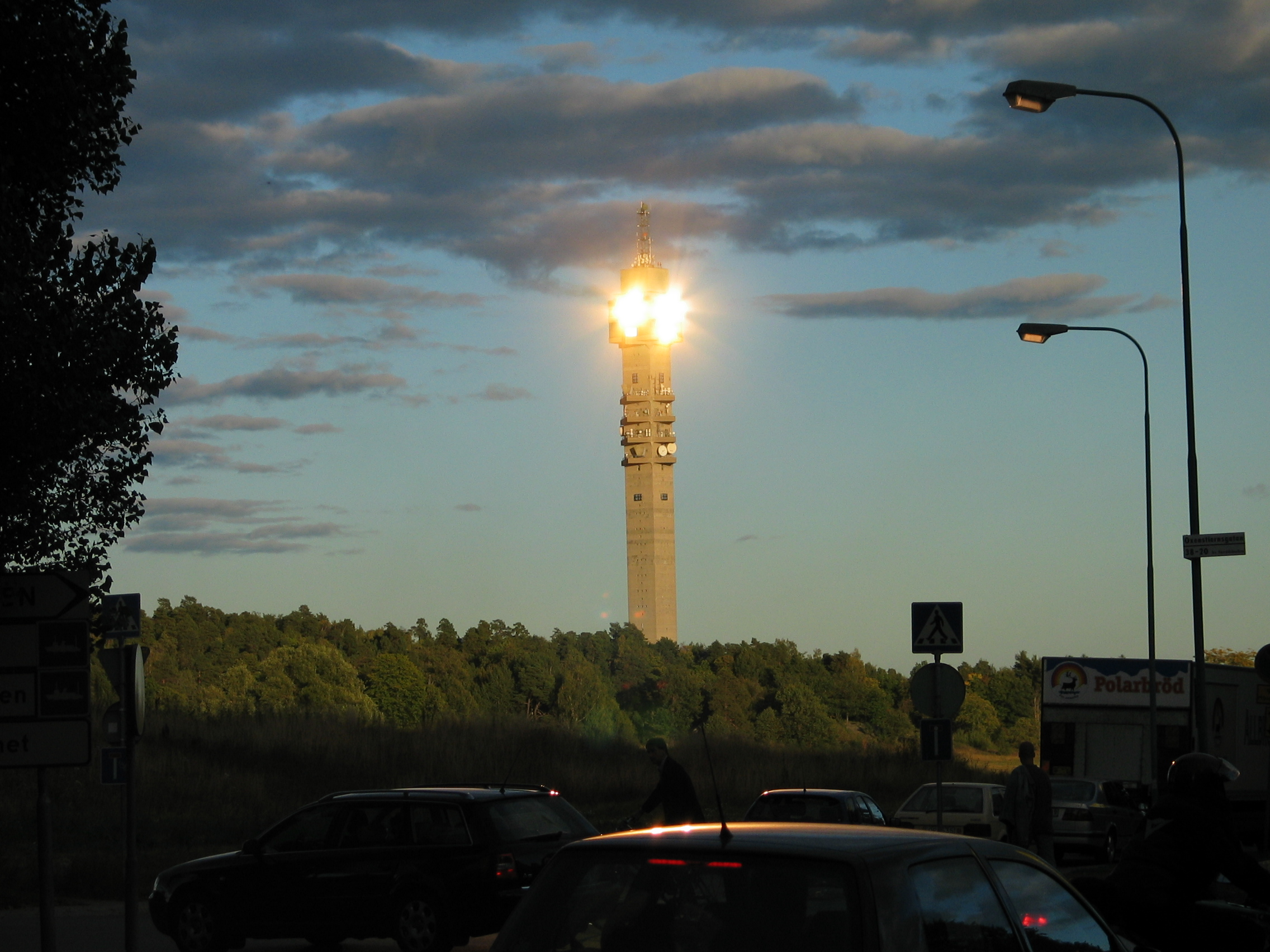 Kaknäs tower. Stockholm, Sweden.